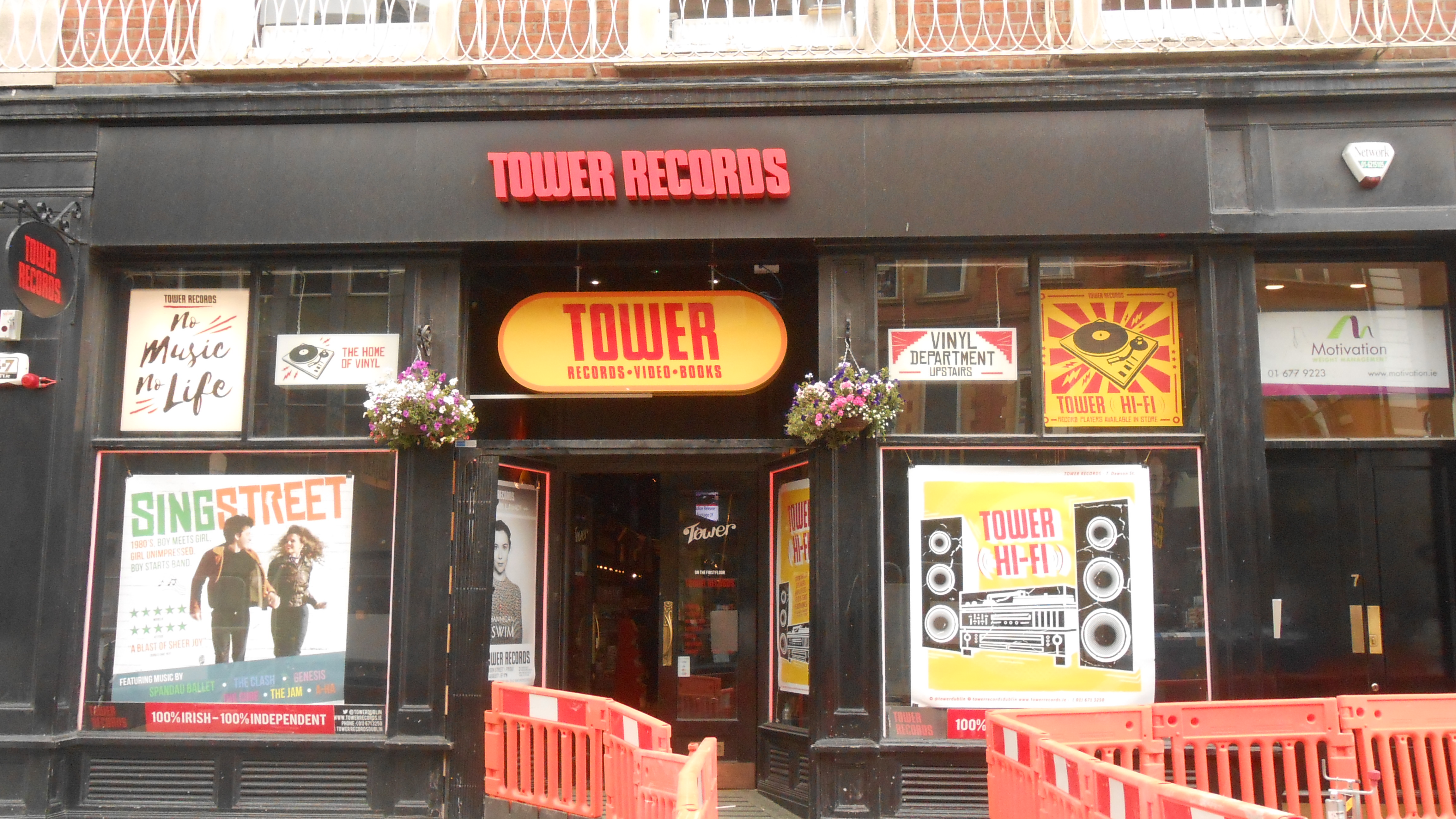 Tower Records in Dublin.